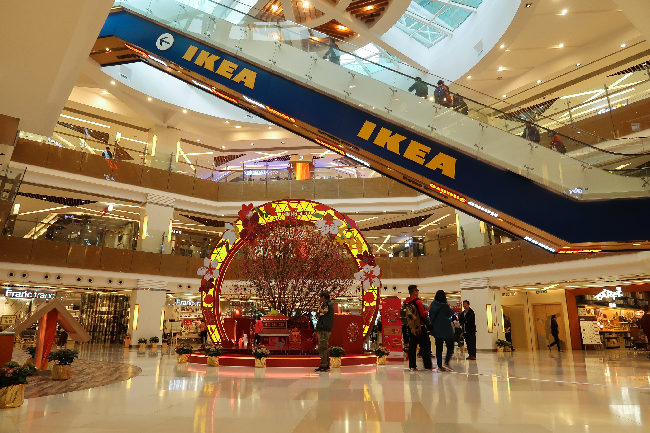 Homesquare Atrium